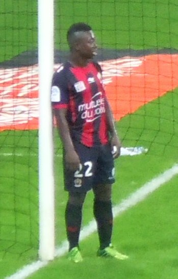 Nampalys Mendy